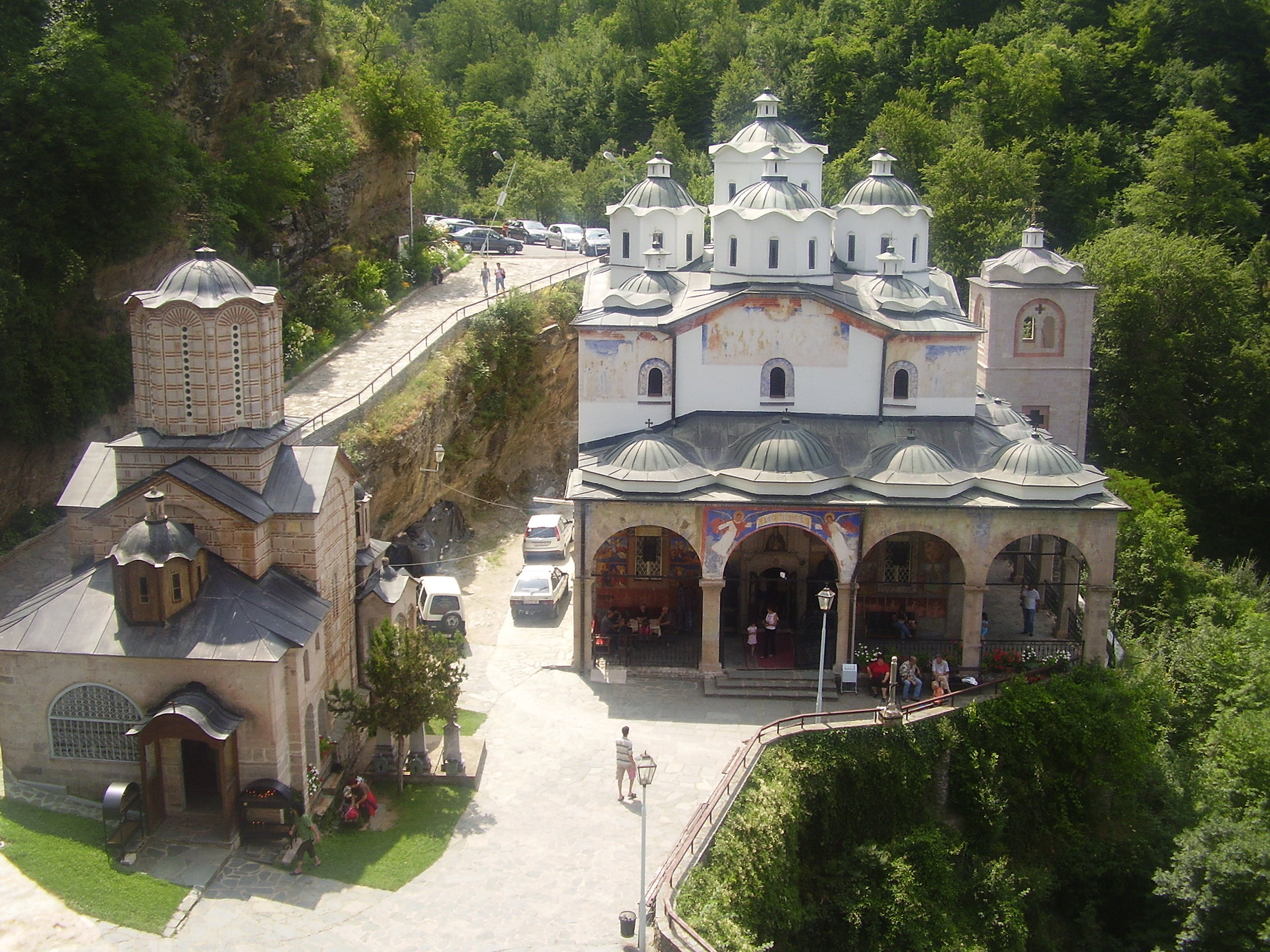 Манастир "Свети Йоаким Осоговски" до гр.Крива Паланка, Република Македония